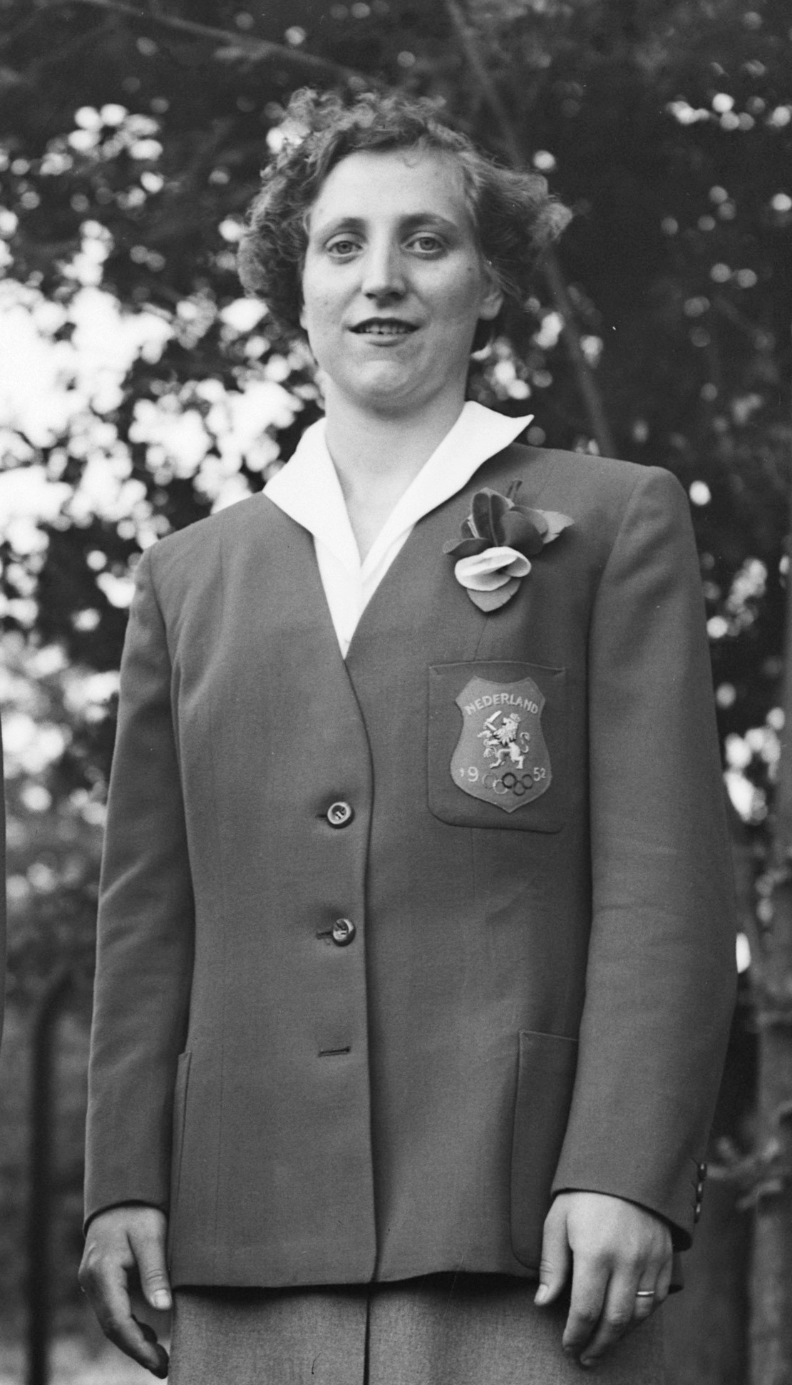 Olympisch Gymnastiekploegen. Lenie Gerrietsen